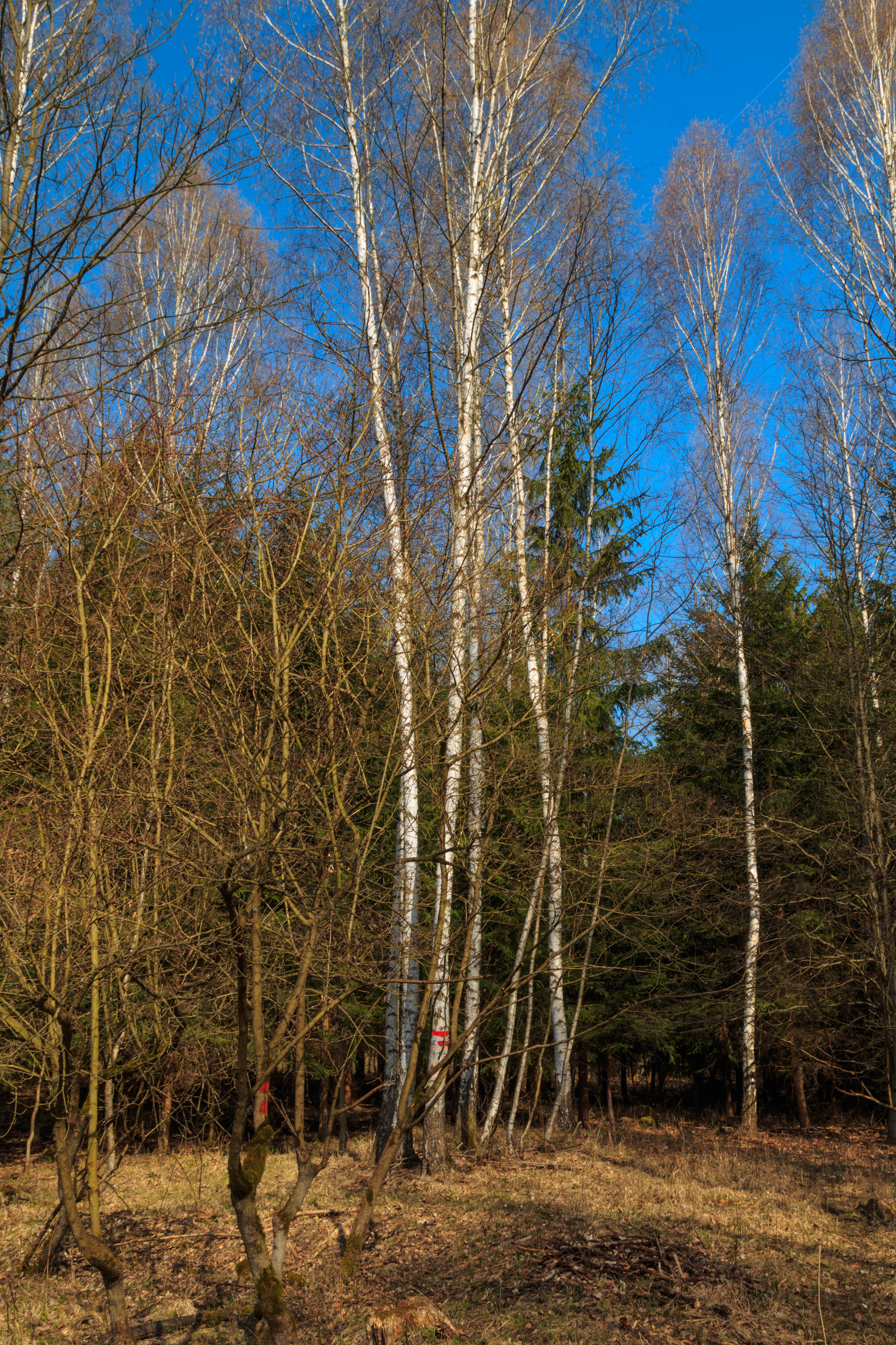 Přírodní památka Hustířanský les Project: Chráněná území.